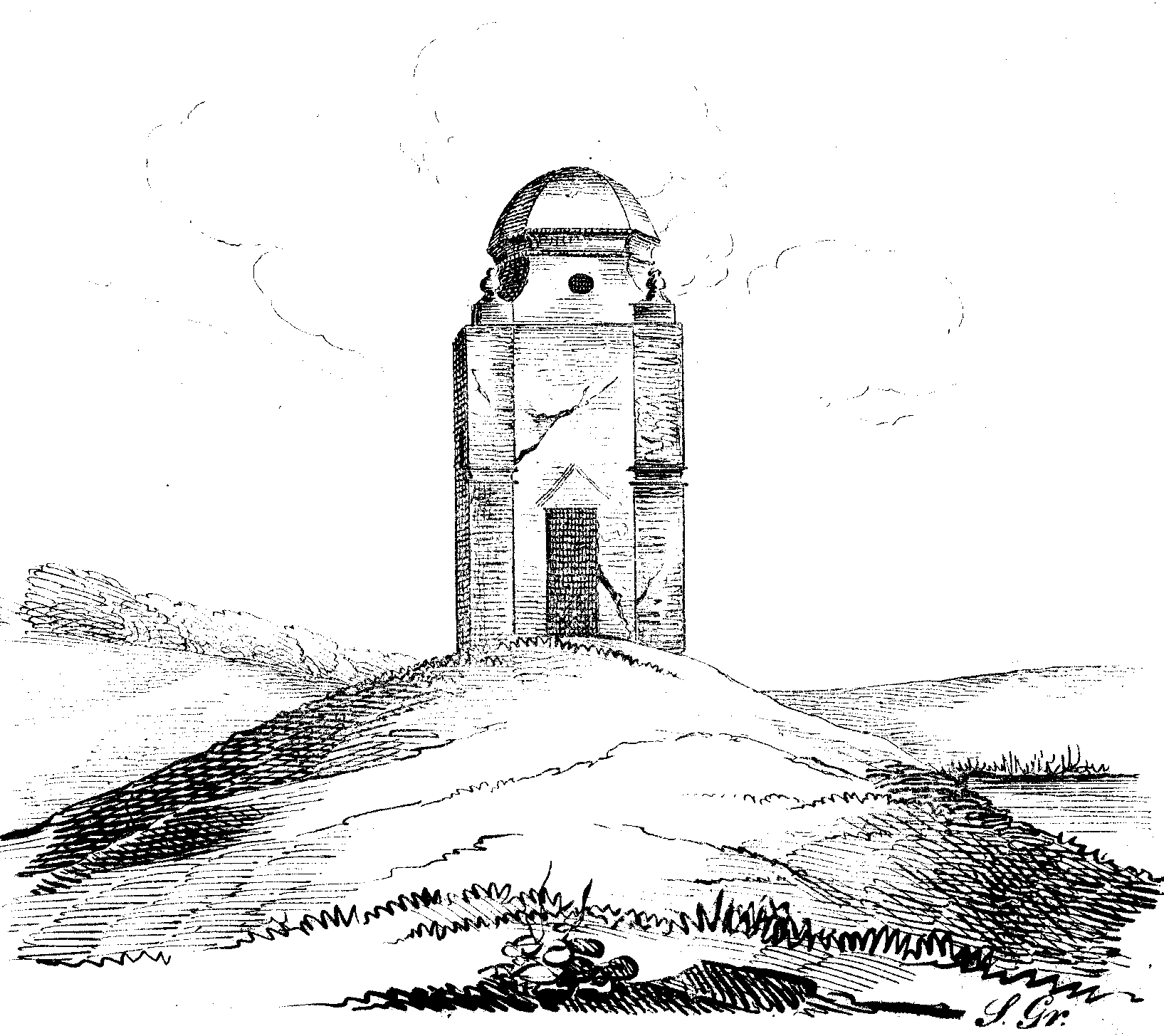 Усипальниця Сенют. Тихомль на Горині.